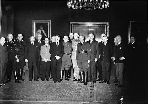 Адолф Хитлер со неговиот кабинет